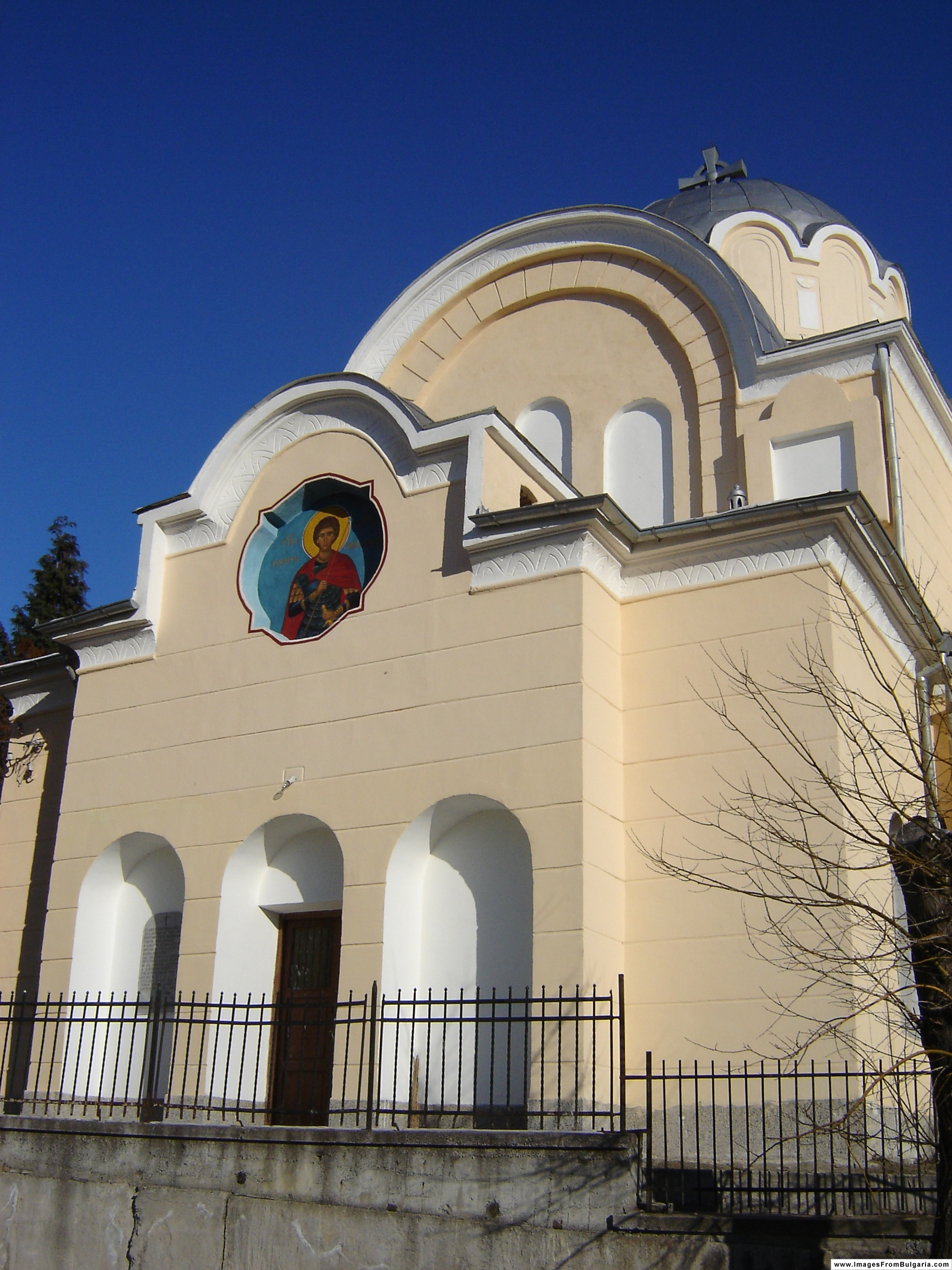 Church in Breznik, Bulgaria